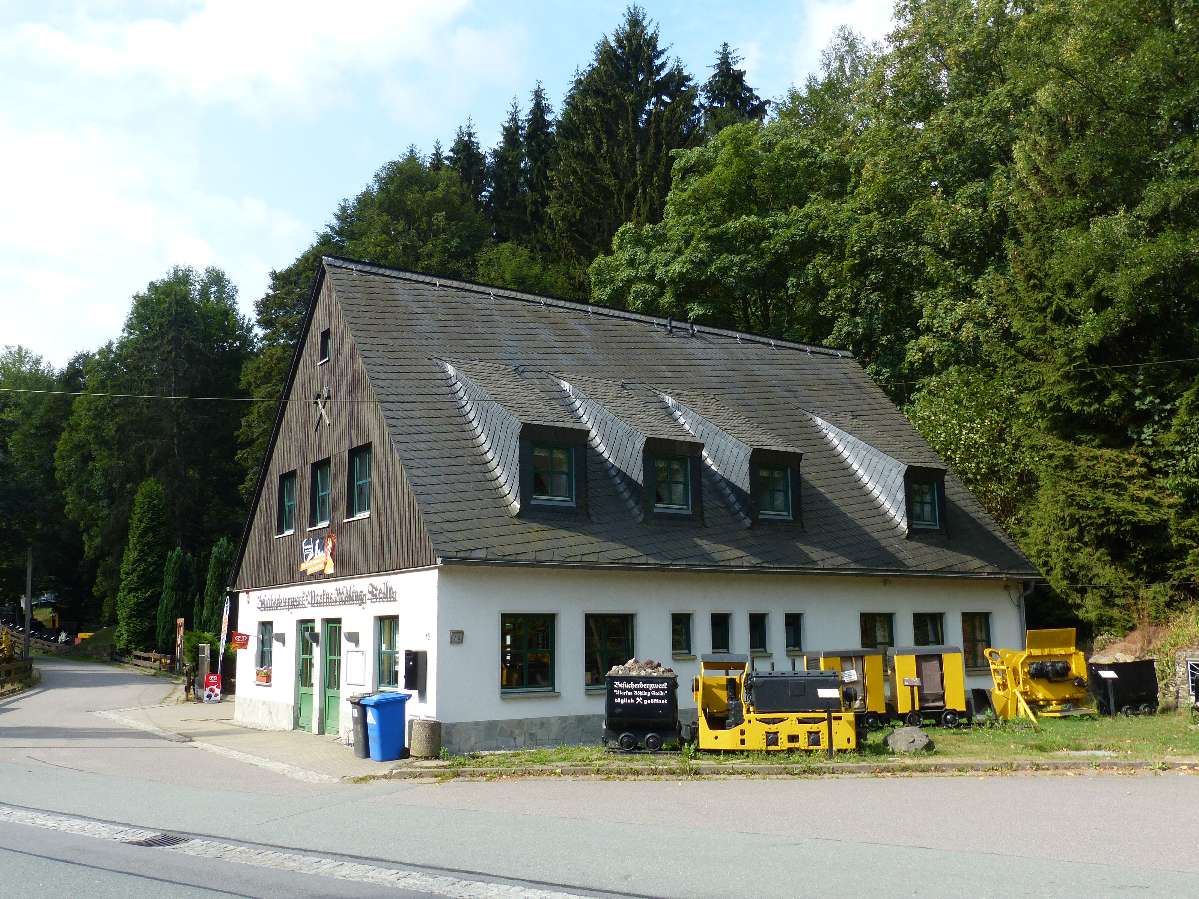 Eingangsgebäude